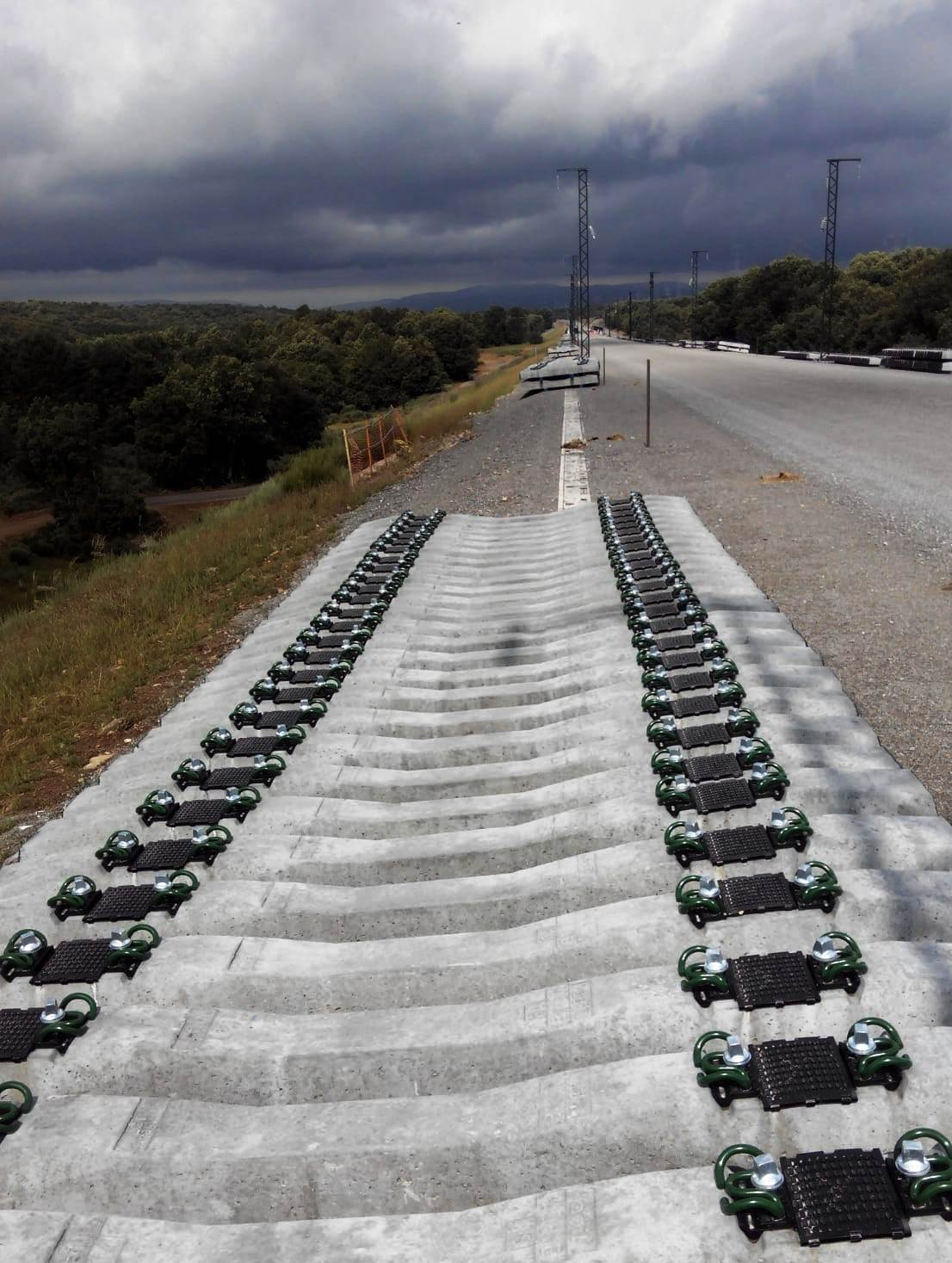 Construcción de la vía del AVE en las cercanías de Asturianos.